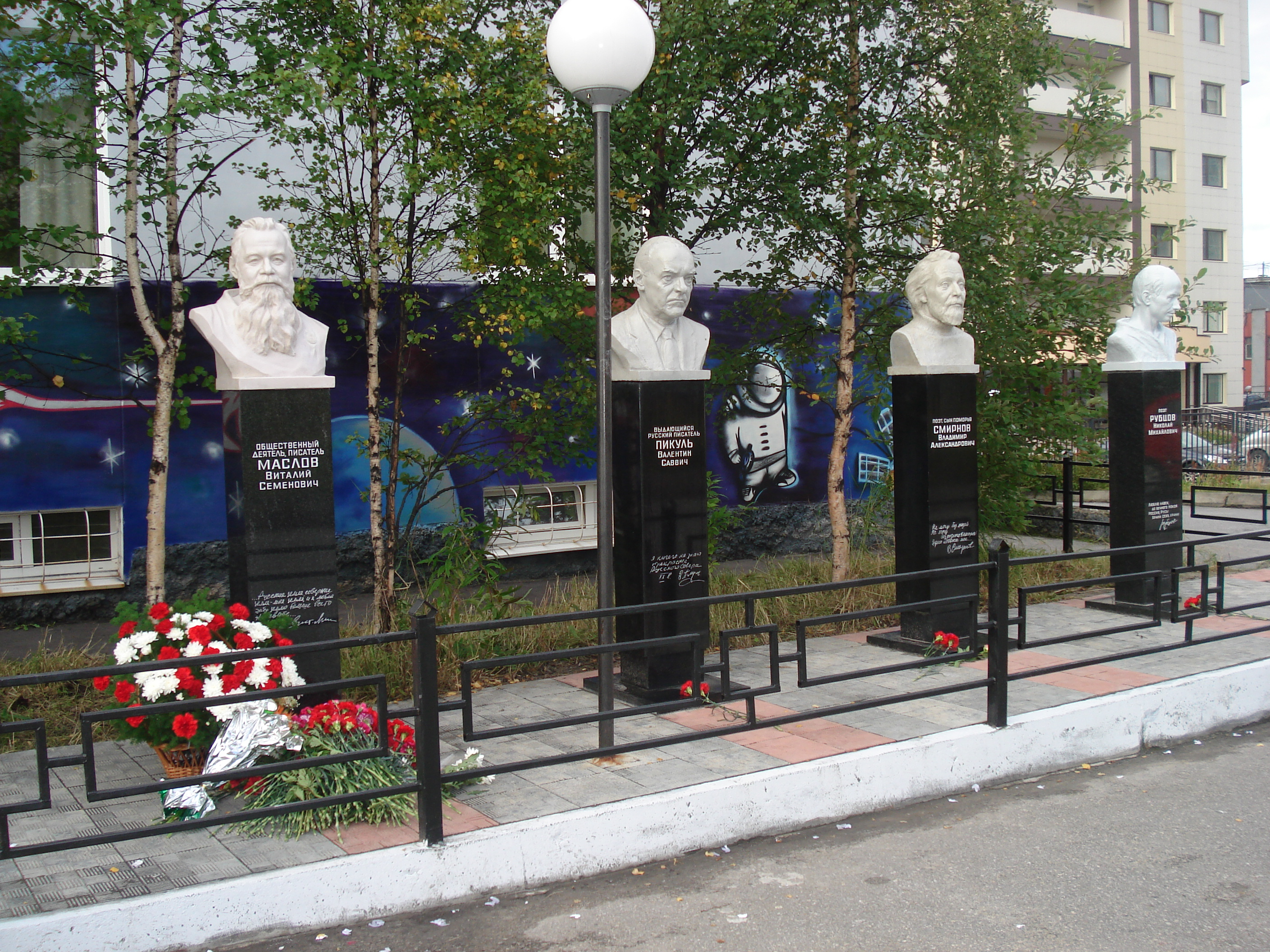 Бюсты - общий вид